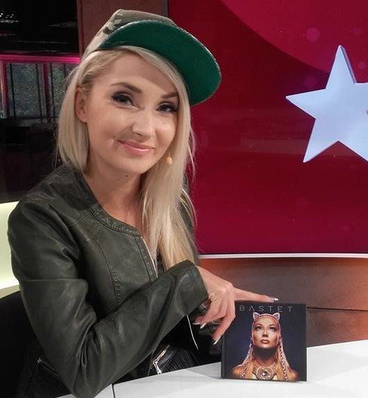 Piosenkarka Joanna "Cleo" Klepko z płytą "Bastet" we wrześniu 2016 roku.